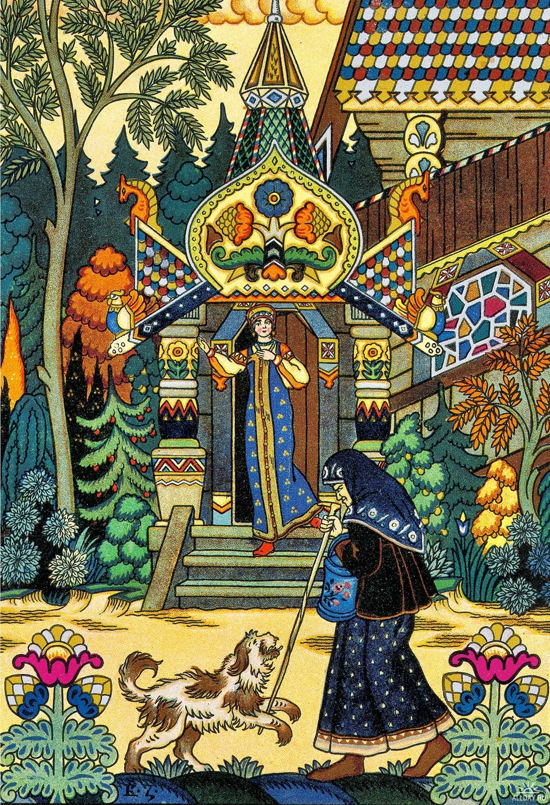 Сказка о мёртвой царевне и о семи богатырях. Иллюсьрация к сборнику сказок А. С. Пушкина, вышедшему в Париже в 1925 году.